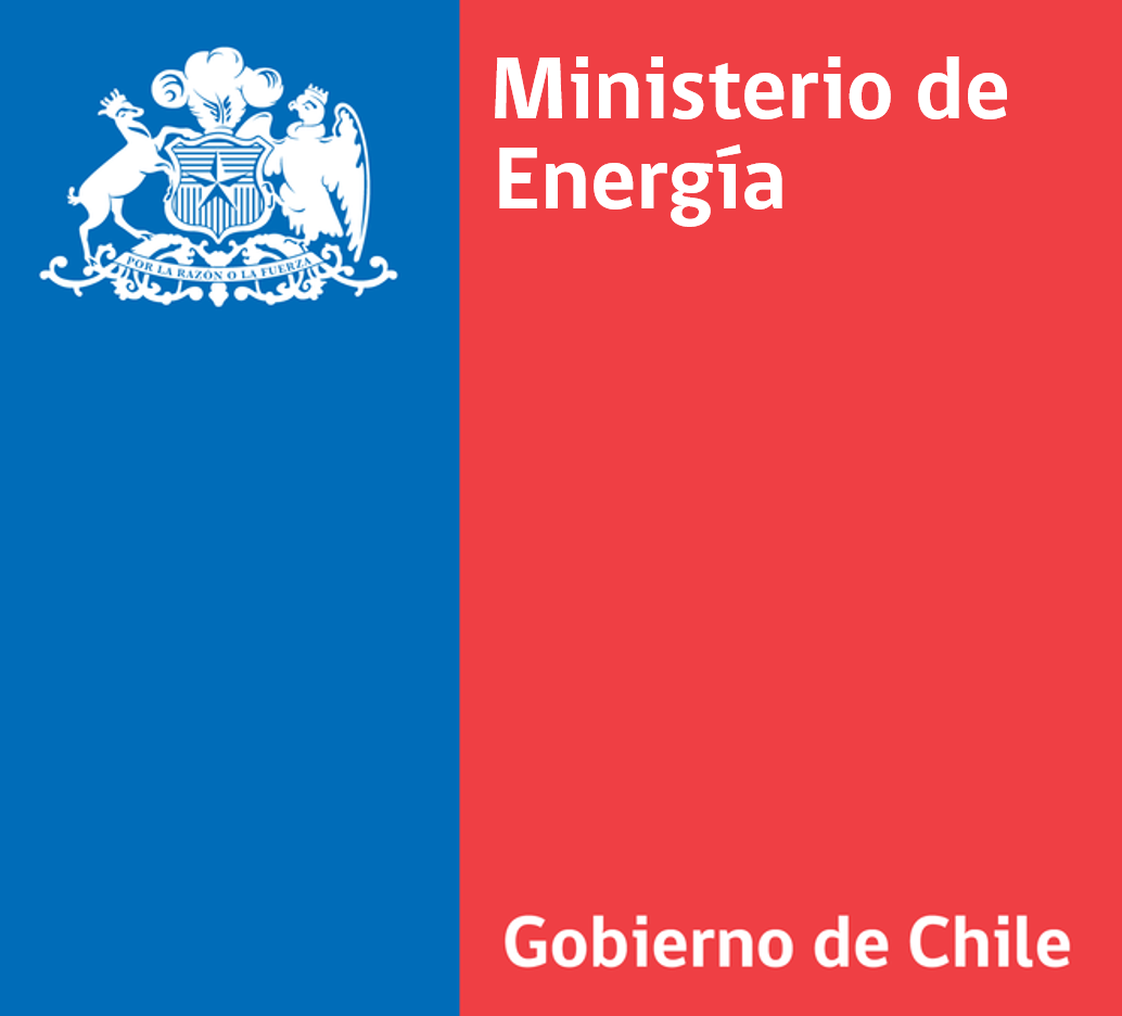 Logo del Ministerio de Energia.